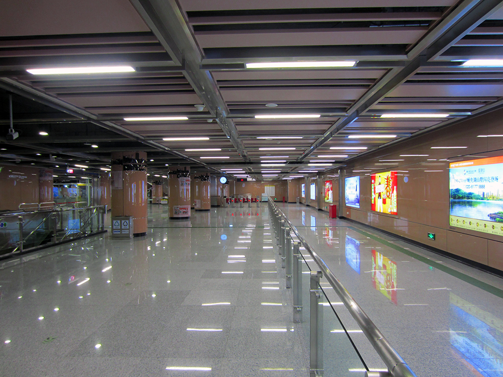 如意坊站站廳